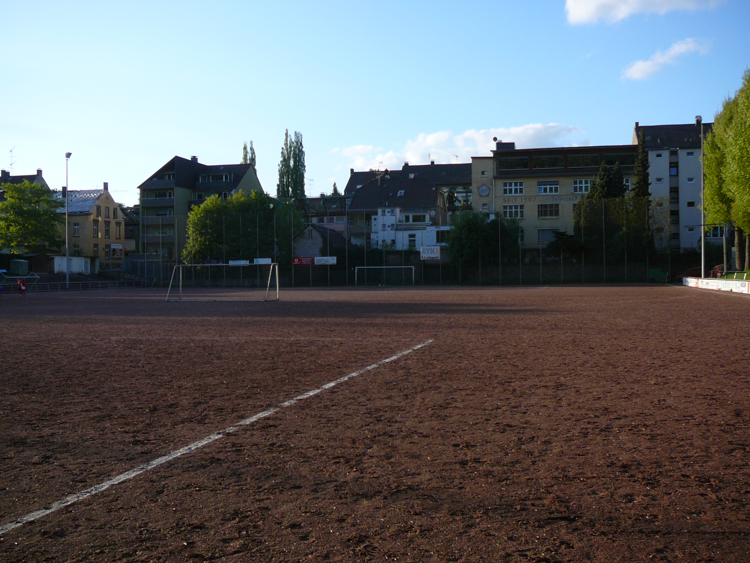 Sonnborner Straße, Wuppertal